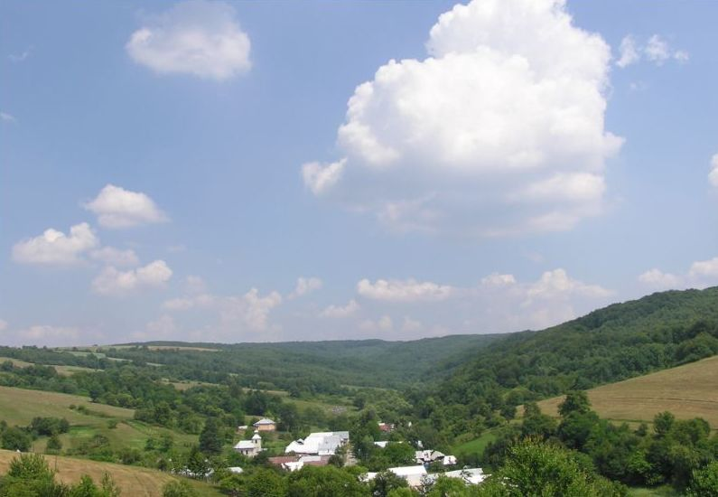 Celkový pohľad